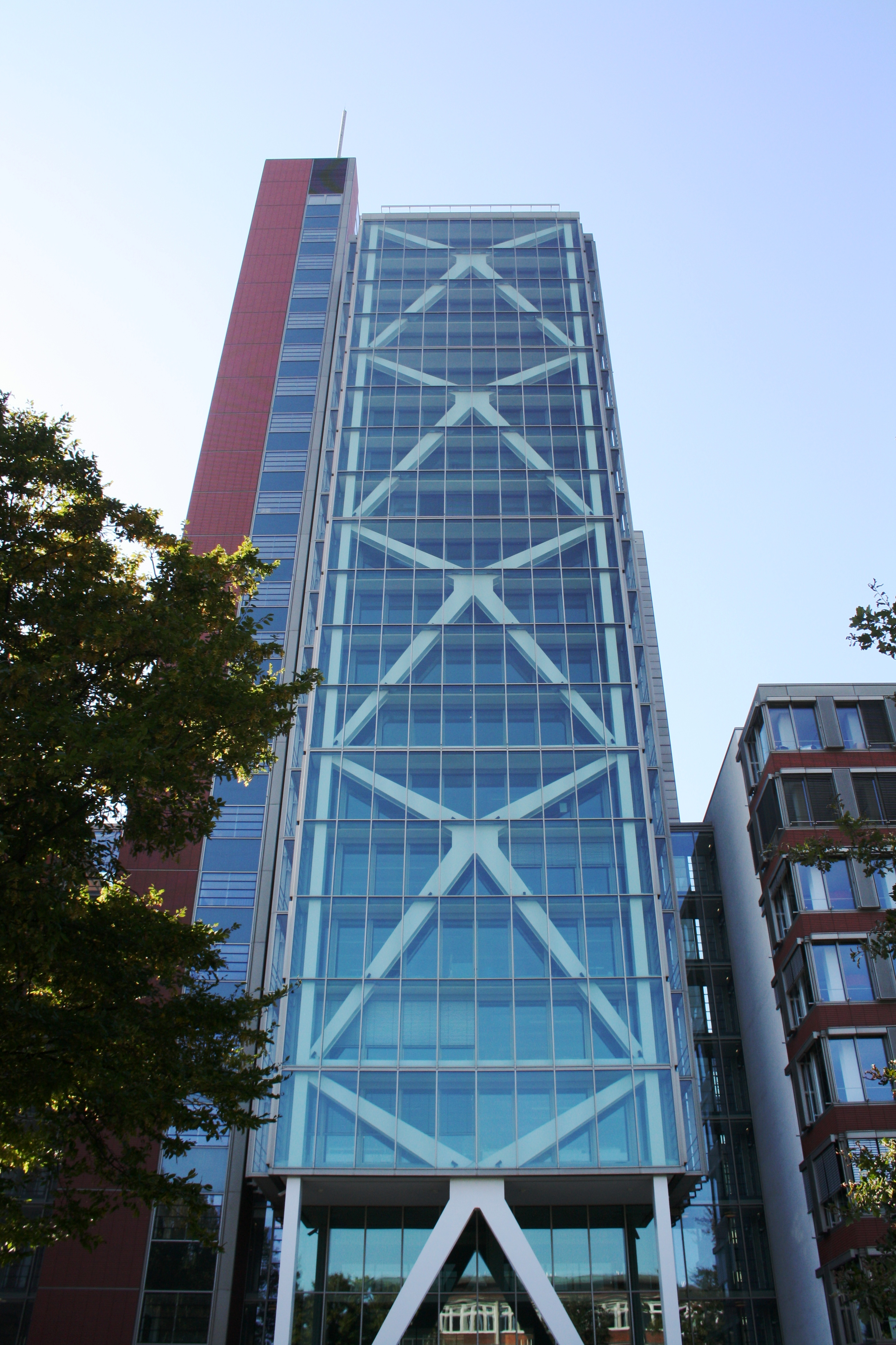 Das Atlantic Haus in Hamburg